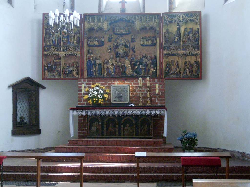 Kamień Pomorski - Ołtarz w katedrze